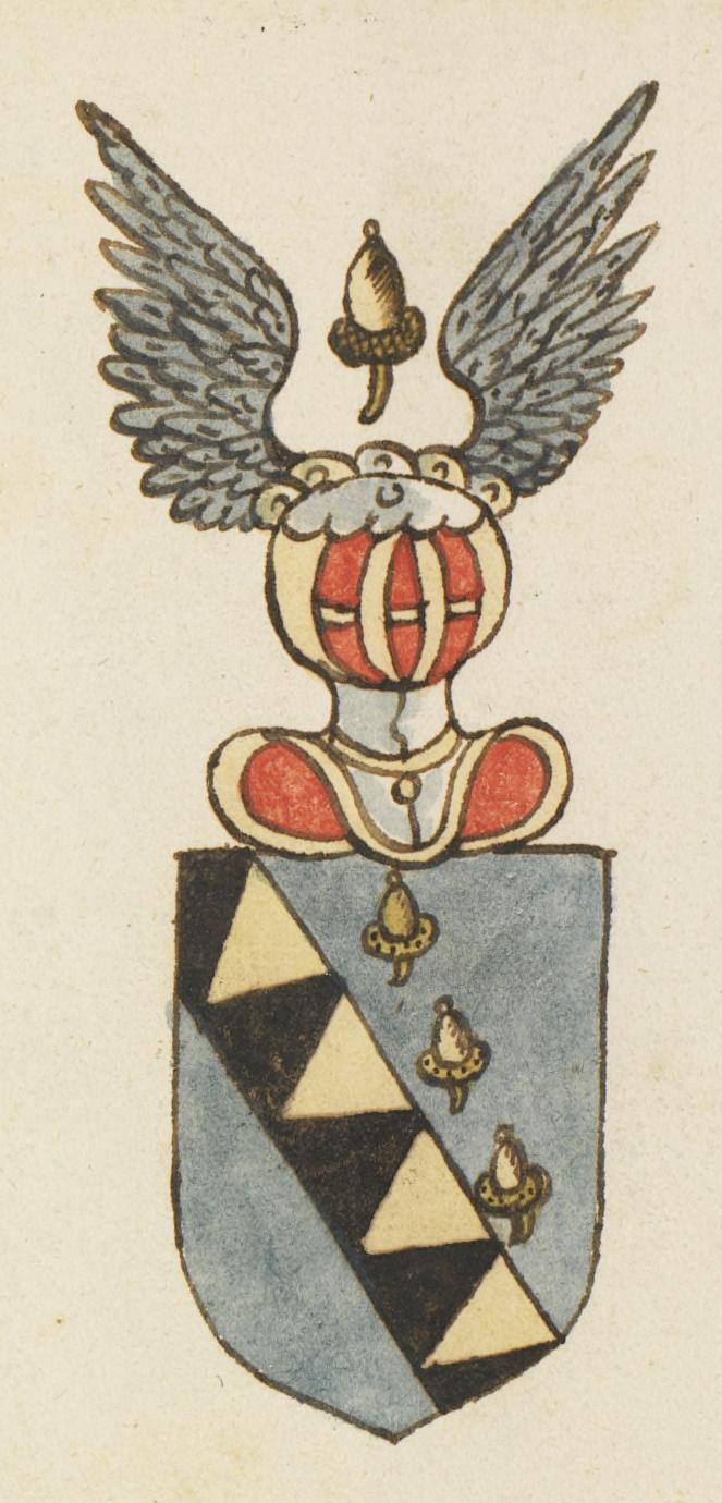 Illustrasjon hentet fra et privatarkiv i Nasjonalbiblioteket med tittelen "Insignia quædam virorum illustrium in Norvegia quodam habitantium" av Iver Nielssøn Hirtzholm.